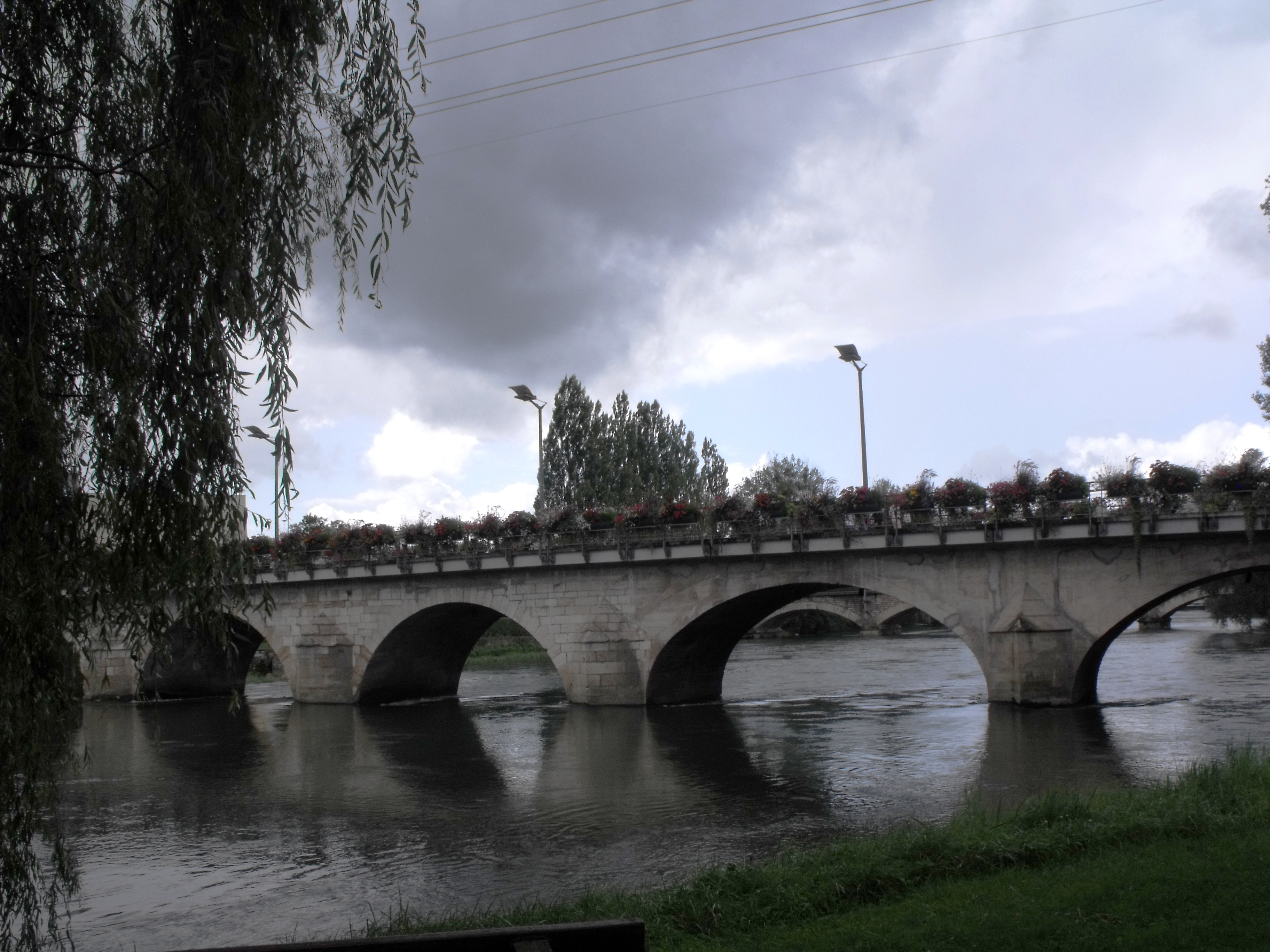 Pont sur le Doubs, à Voujeaucourt, Doubs, France